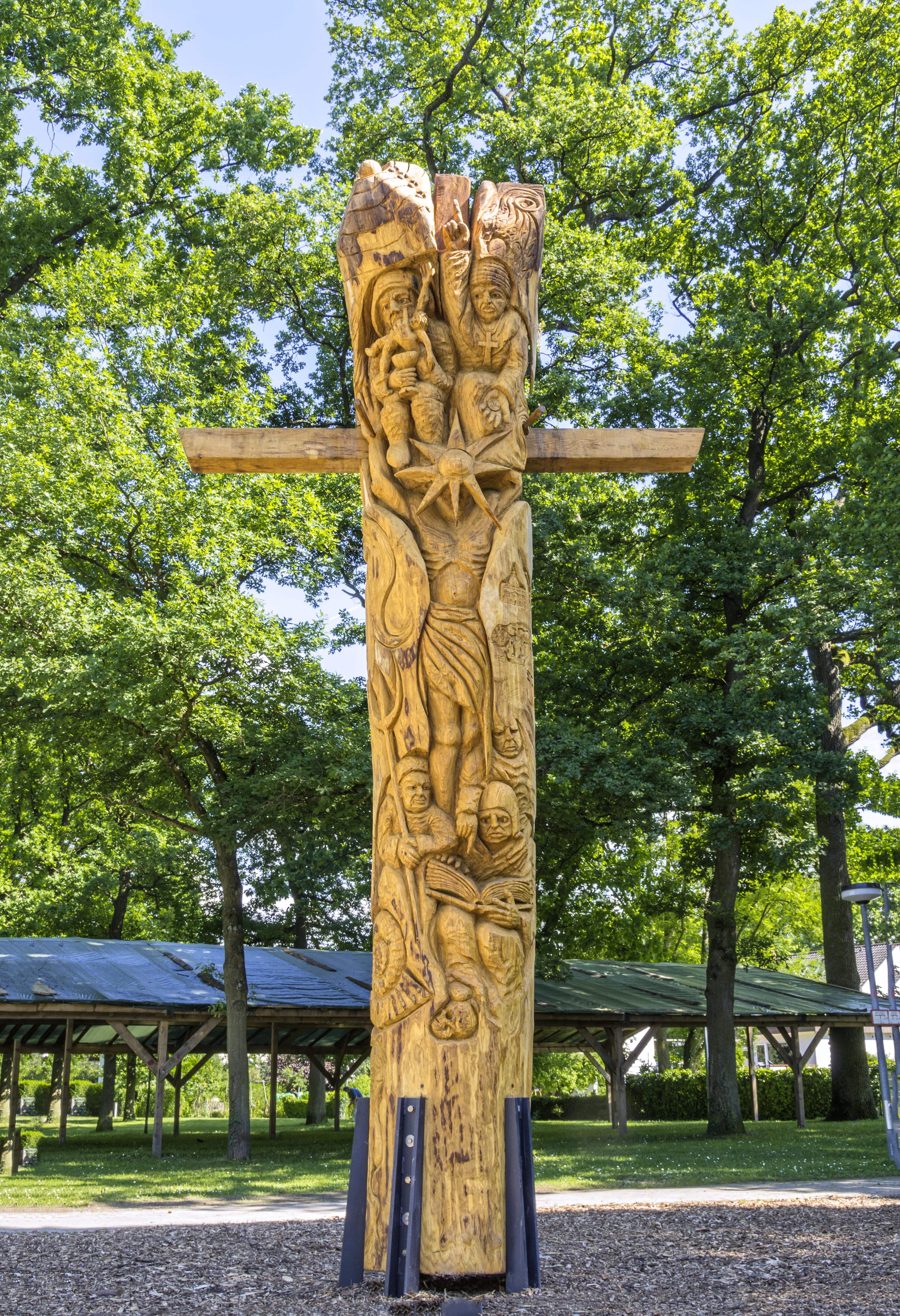 Die im Juni 2013 in Lehen aufgestellte Bundschuheiche